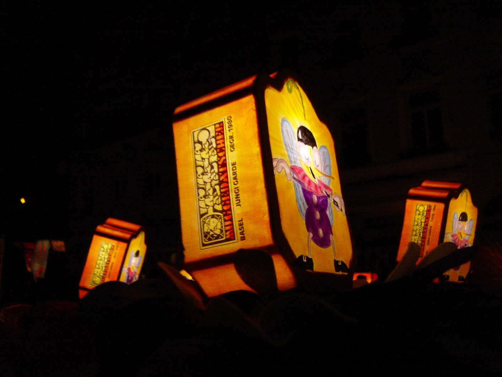 Erstellt am: 1.03.2004 um 05:43:52 Urheber: Christian Walk